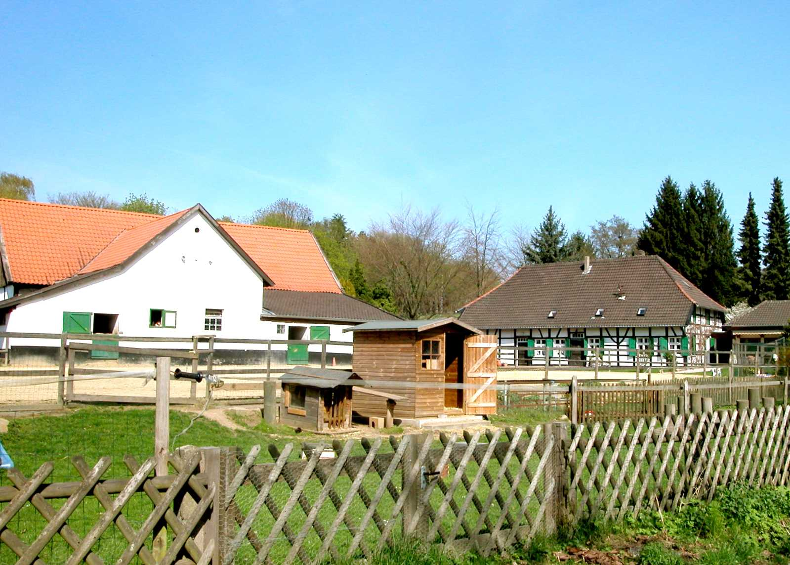 Lierhaushof, Mülheim an der Ruhr Object location51° 24′ 12.9″ N, 6° 54′ 00.7″ E